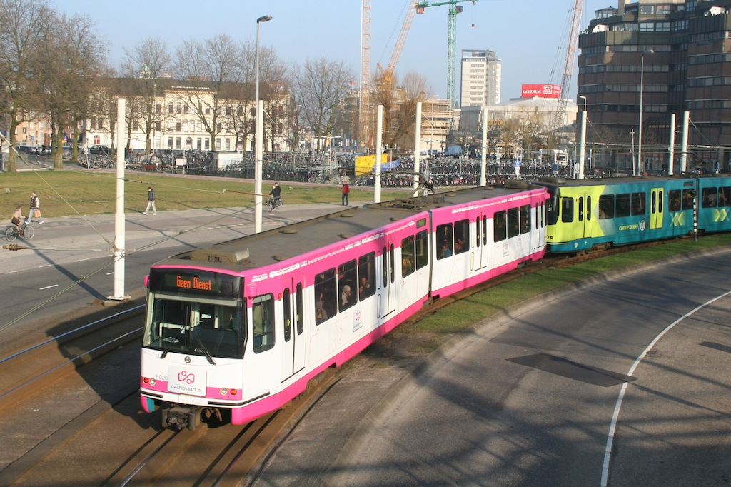 Sneltram Utrecht in OV-Chipkaart uitmonstering. Smakkelaarsveld te Utrecht; 3 maart 2011. Foto: Erik Swierstra.